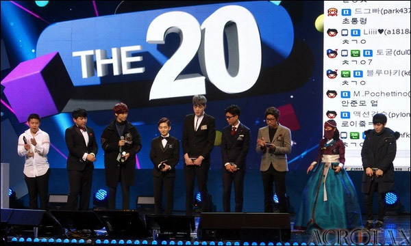 2015년 아프리카TV BJ대상 'THE 20' 분야에서는 각 부문별 최고 BJ들을 선정하고 있는 모습